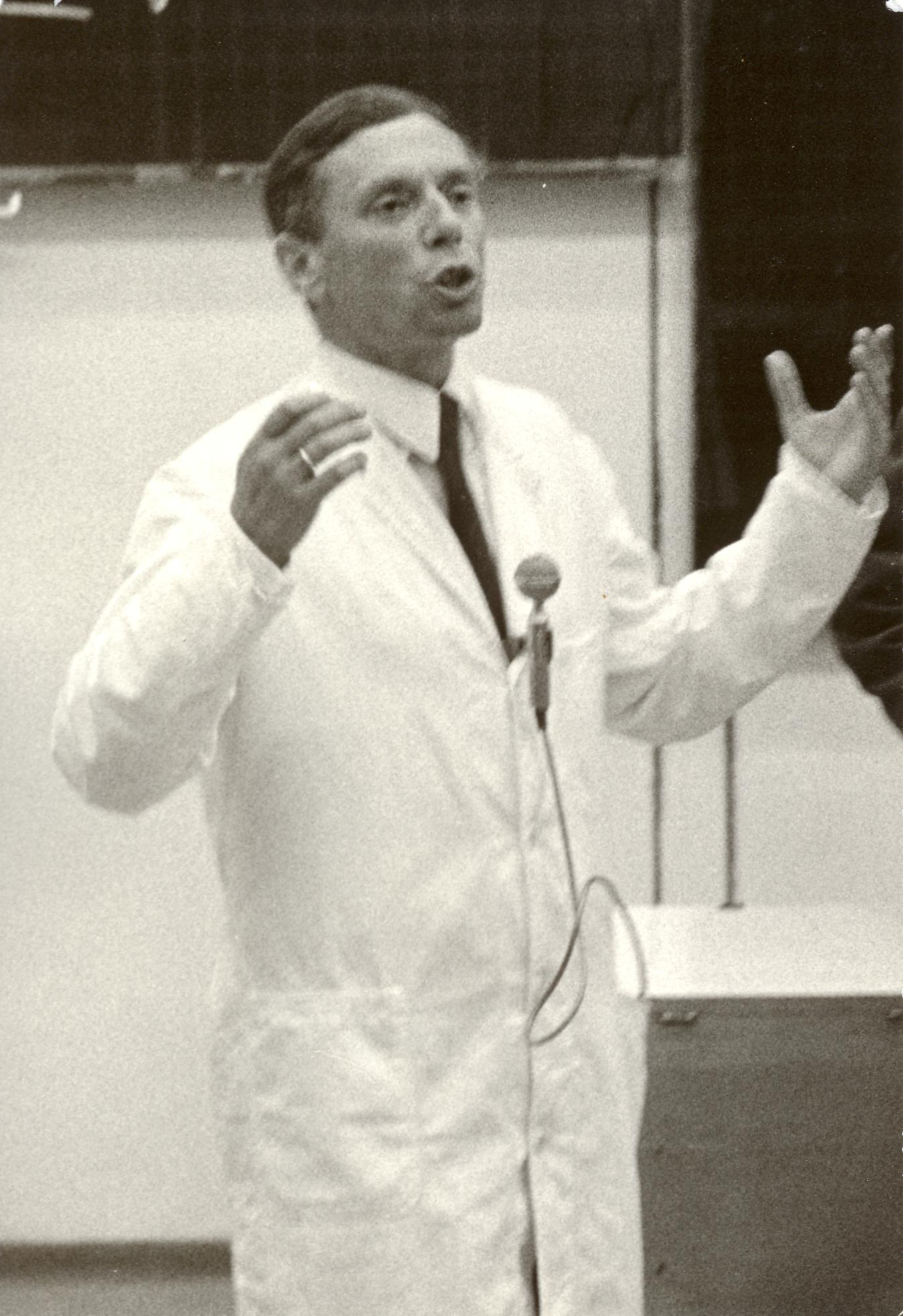 Vorlesung an der TH Darmstadt